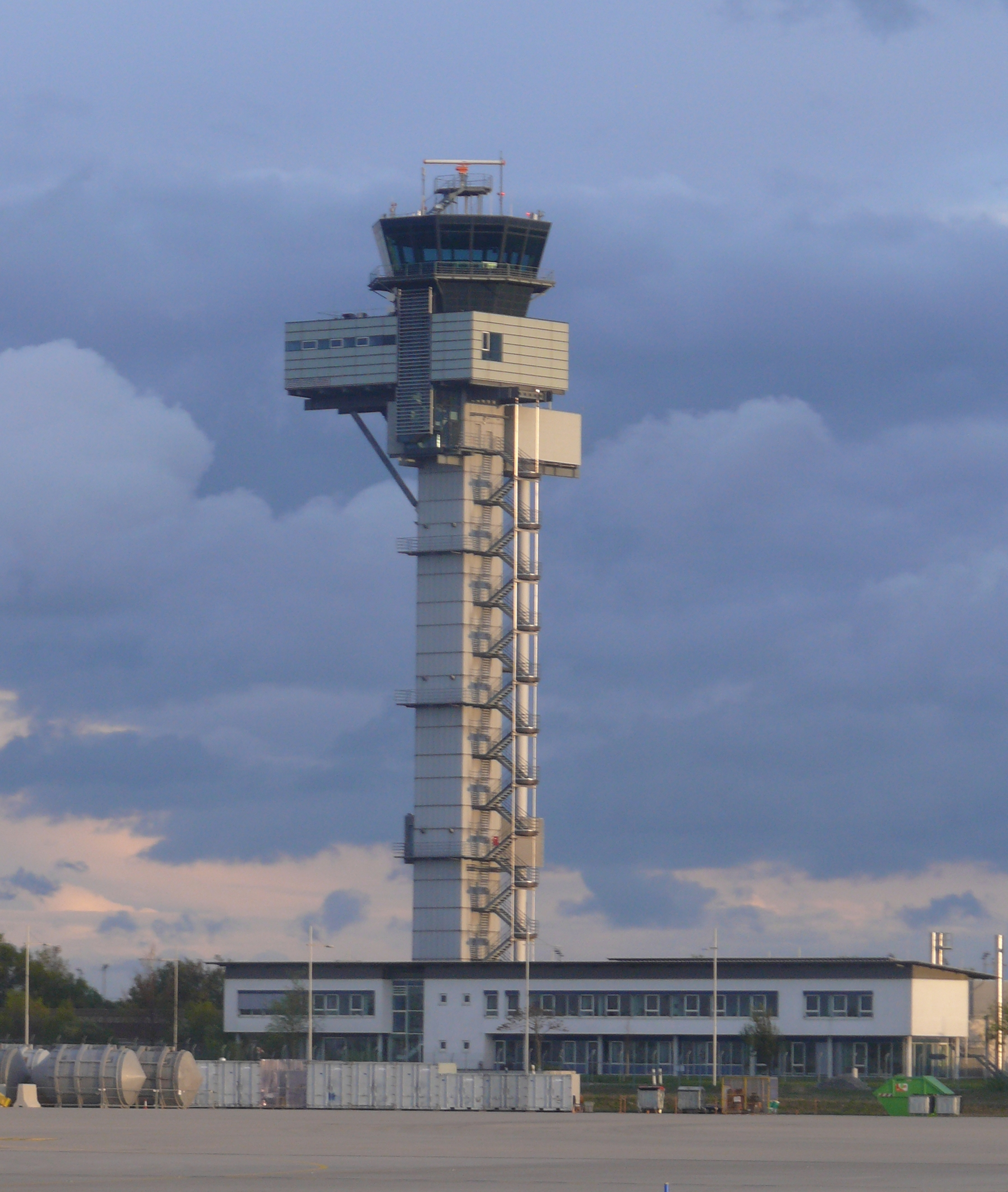 Controletoren op Leipzig/Halle Airport.